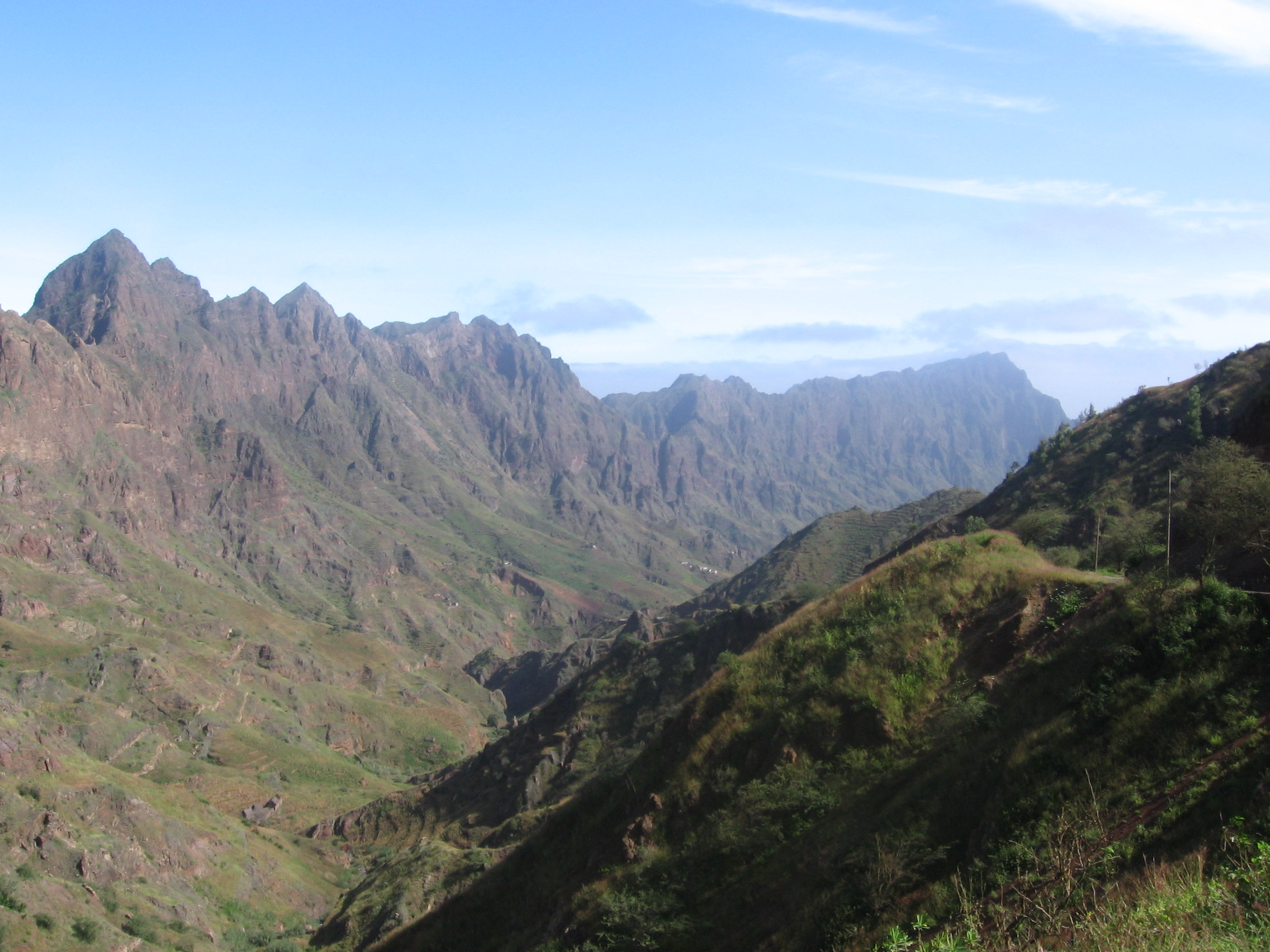 Vale da Ribeira Grande, Santo Antão, Cabo Verde